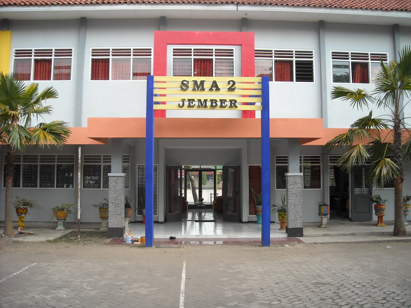 SMA Negeri 2 Jember